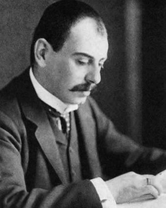 Bild des Mathematikers Edmund Landau